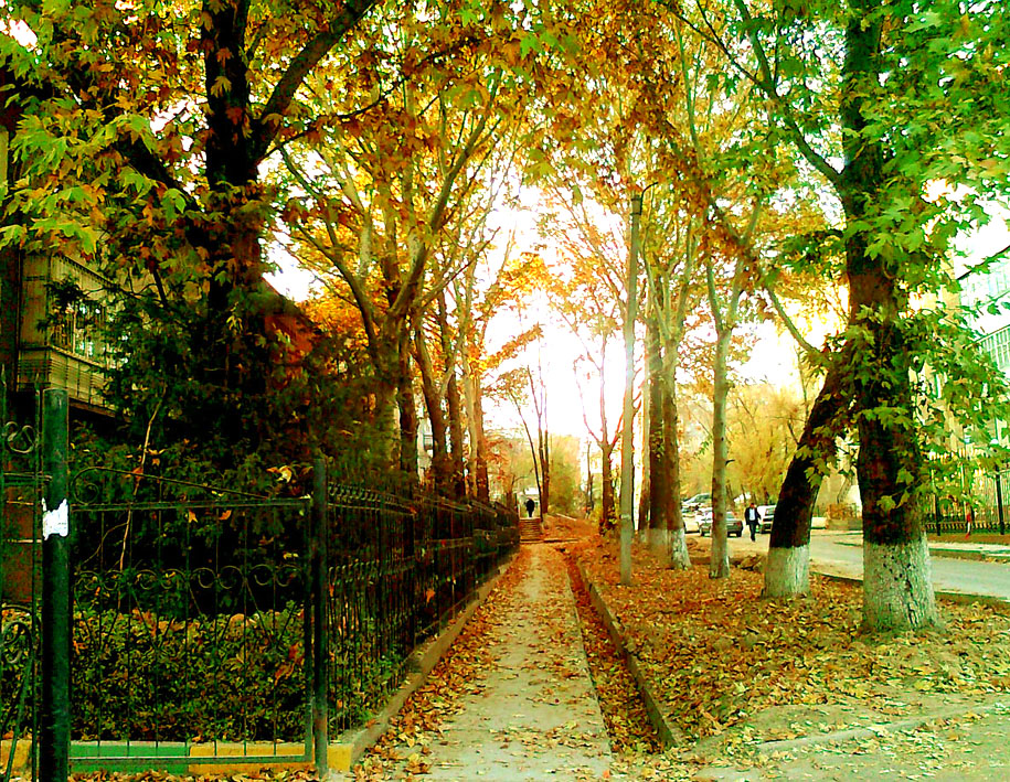 Аллея за ЦУМом (г. Шымкент).